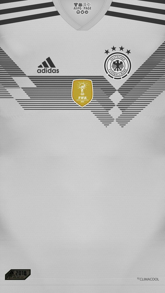 Camiseta De Alemania 2018